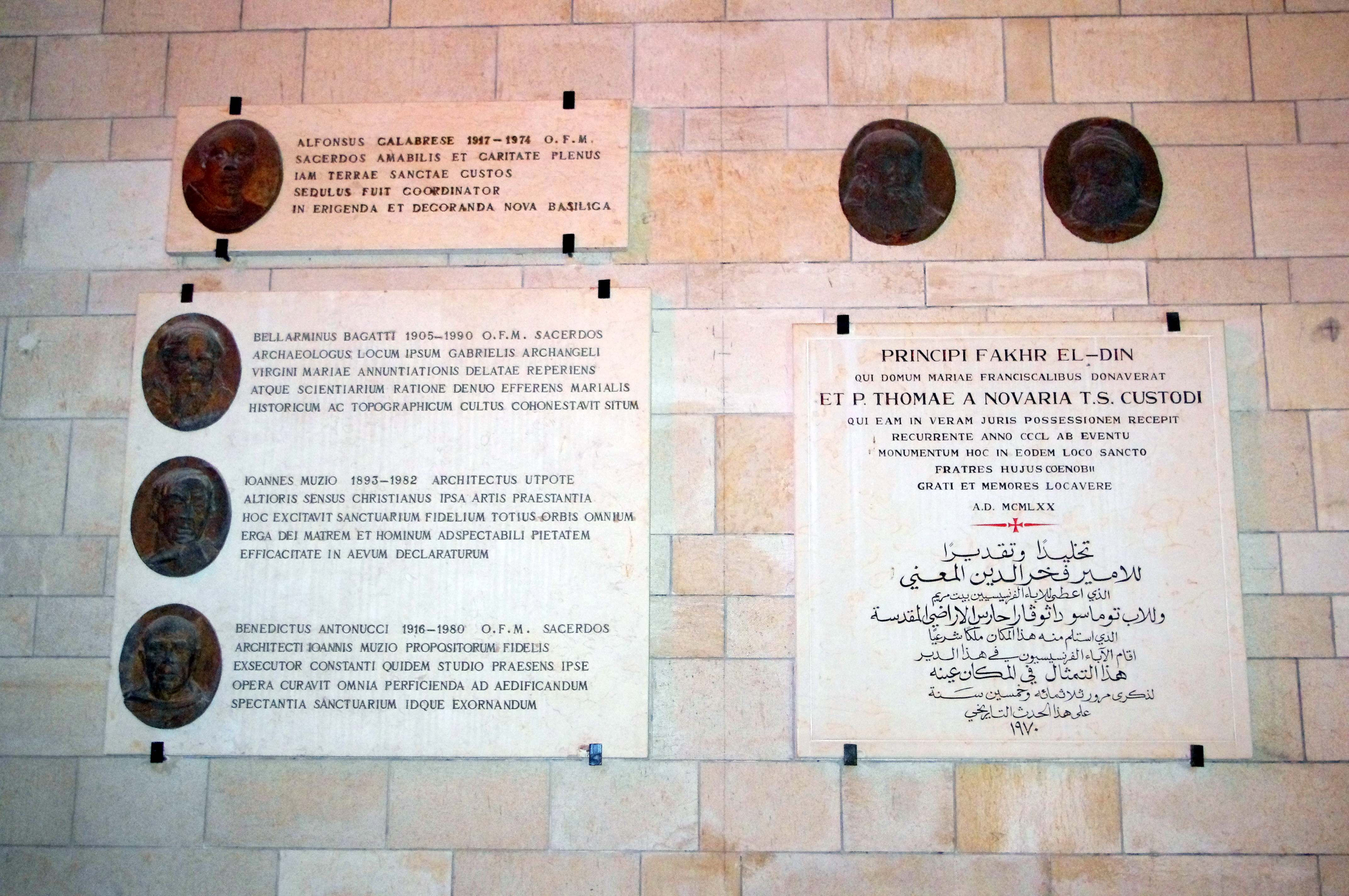 Nápis